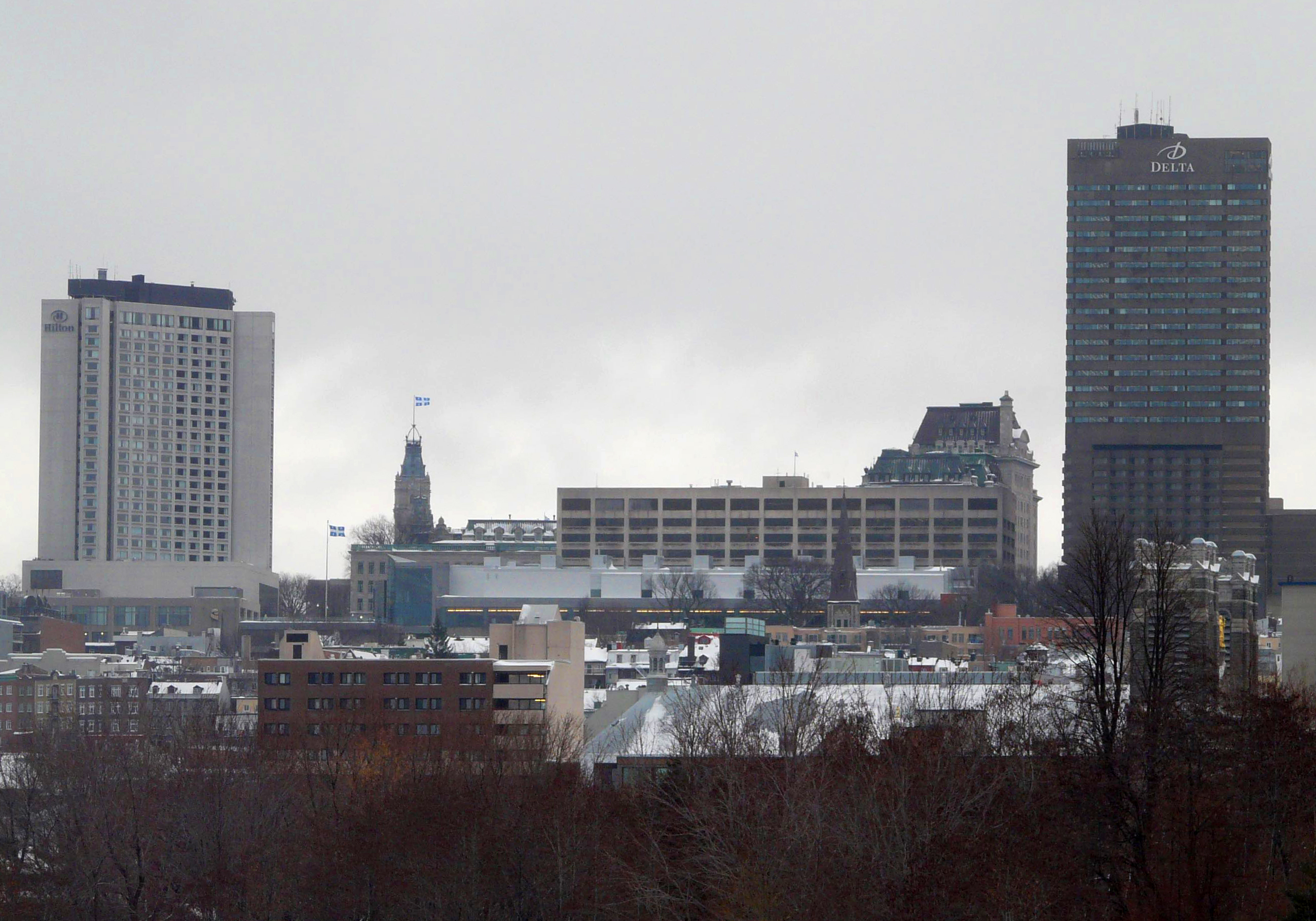 La colline parlementaire de Québec et le quartier Saint-Jean-Baptiste.